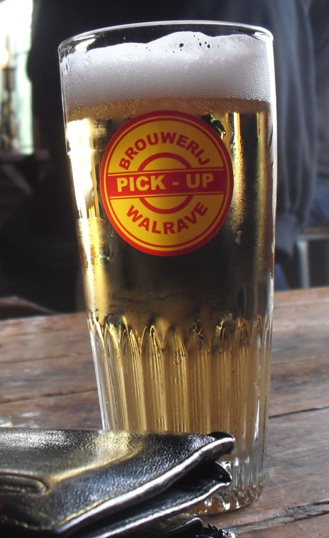 Pick Up Pils - Brouwerij Walrave - Laarne - Oost-Vlaanderen - België